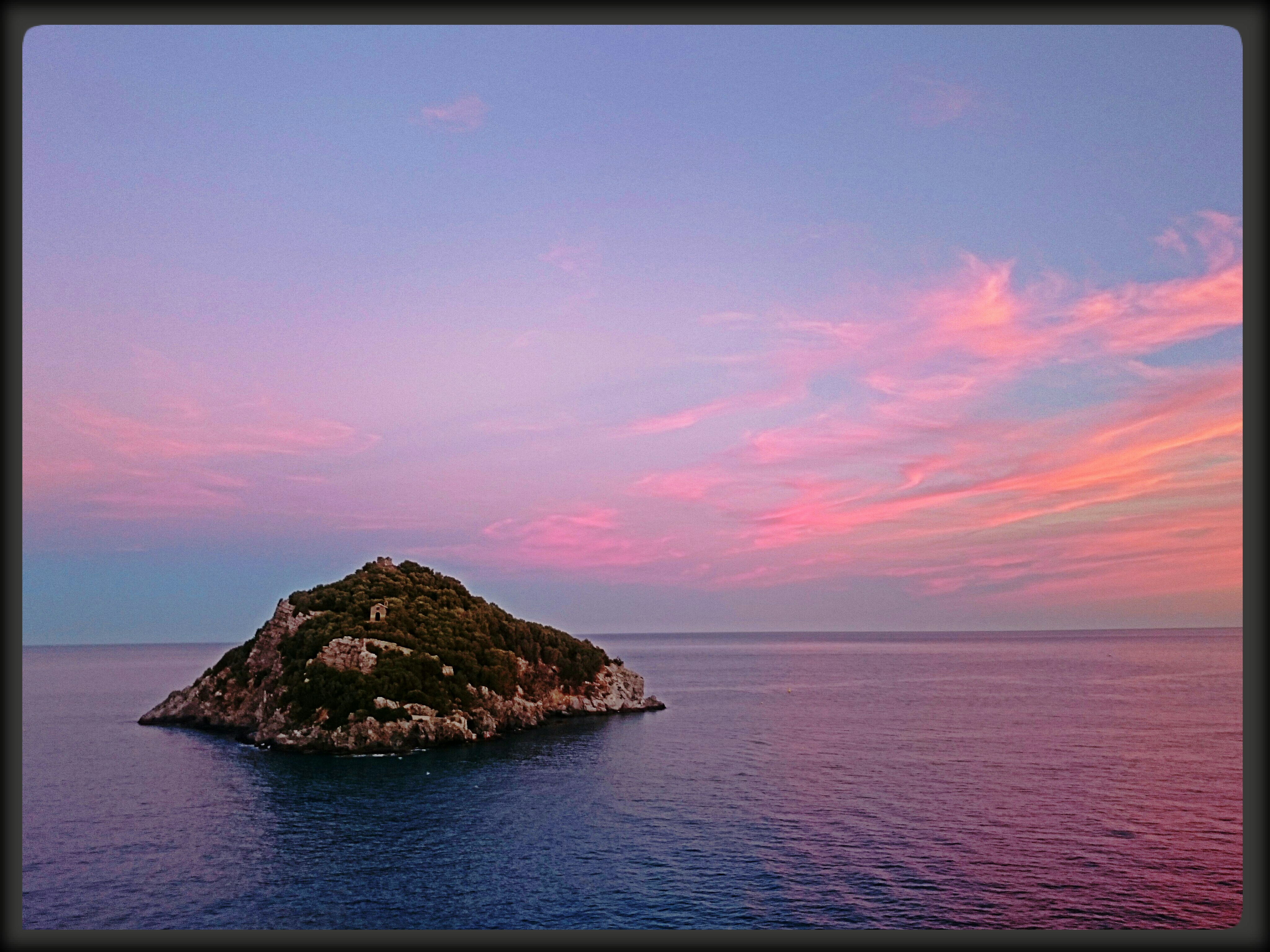 L'isola di Bergeggi ( Sant'Eugenio) al tramonto nel mese di Agosto